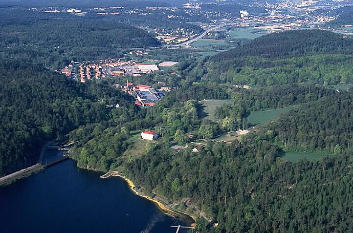 Motiv: Jonsered Nyckelord: Flygbilder, Riksintressen Kategori: Miljöer, Tätort Jonsered